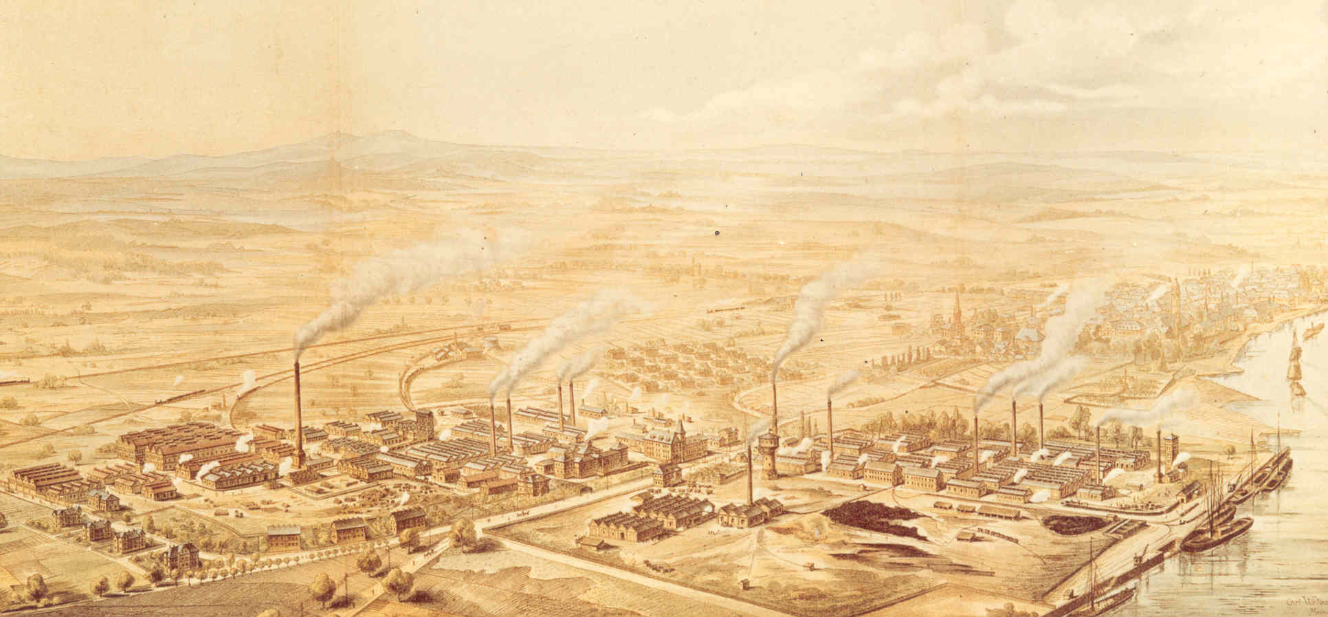 Ausdehnung der Farbwerke vorm. Meister Lucius & Brüning in Höchst